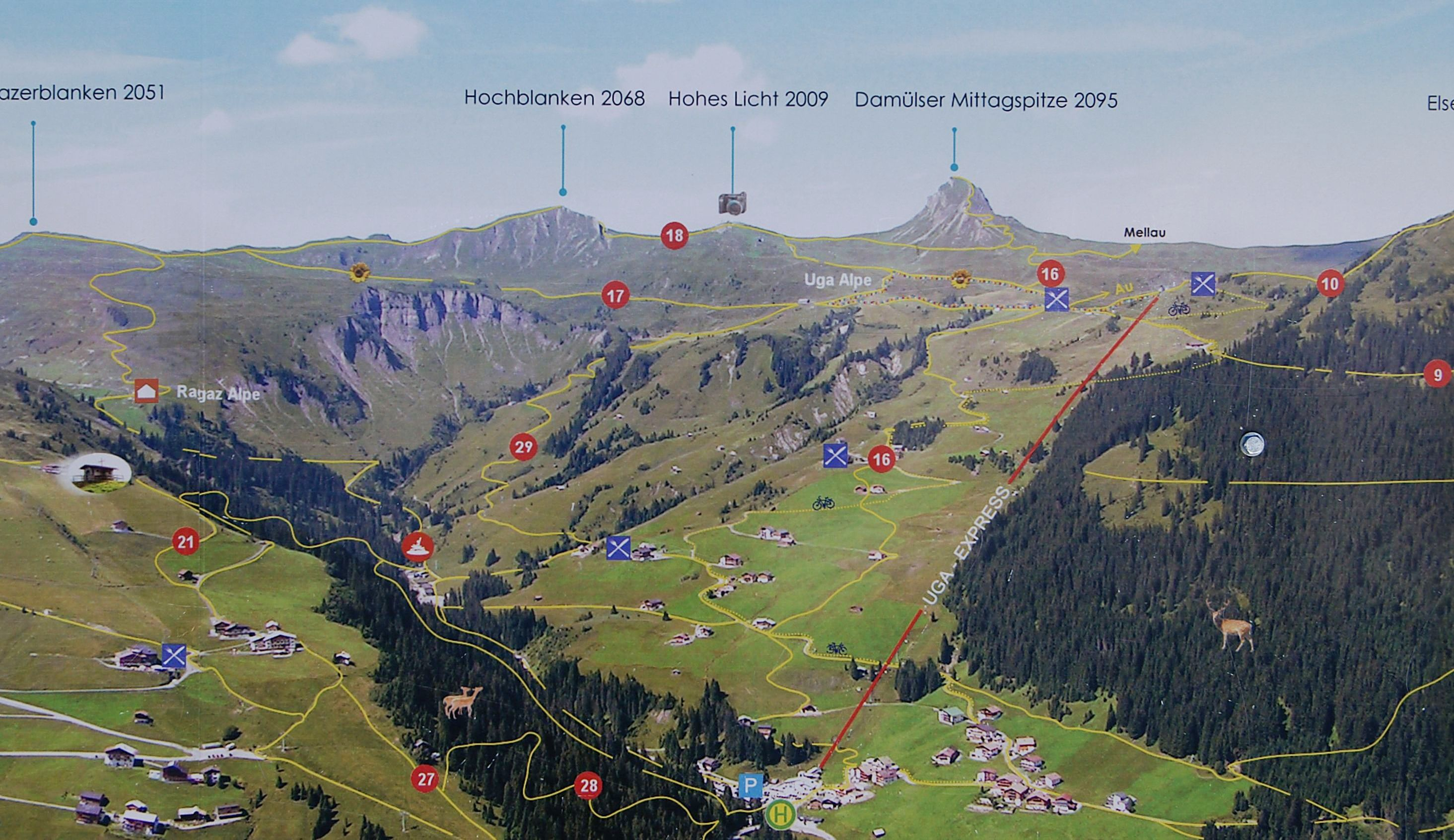 Damüls zum Wandern und Biken .